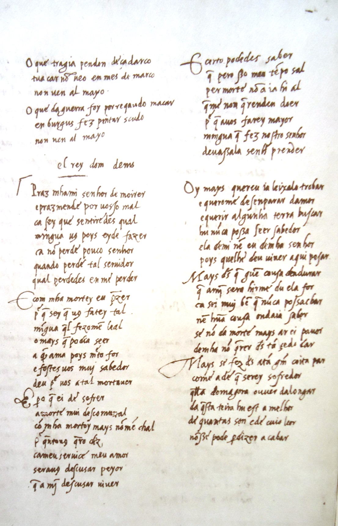 Página do Cancioneiro da Vaticana.